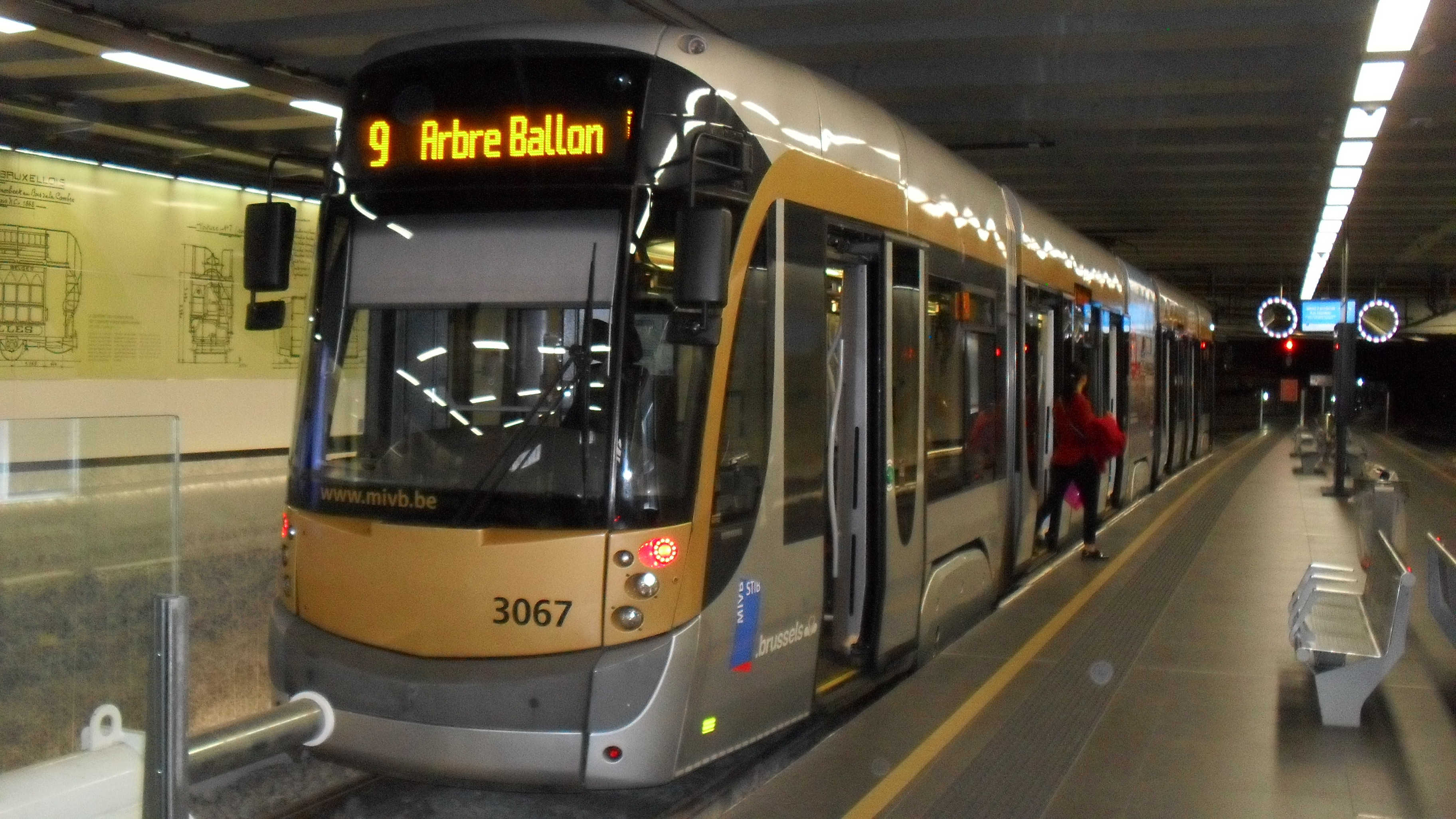 Tramway T3000 de la ligne 9 à Simonis